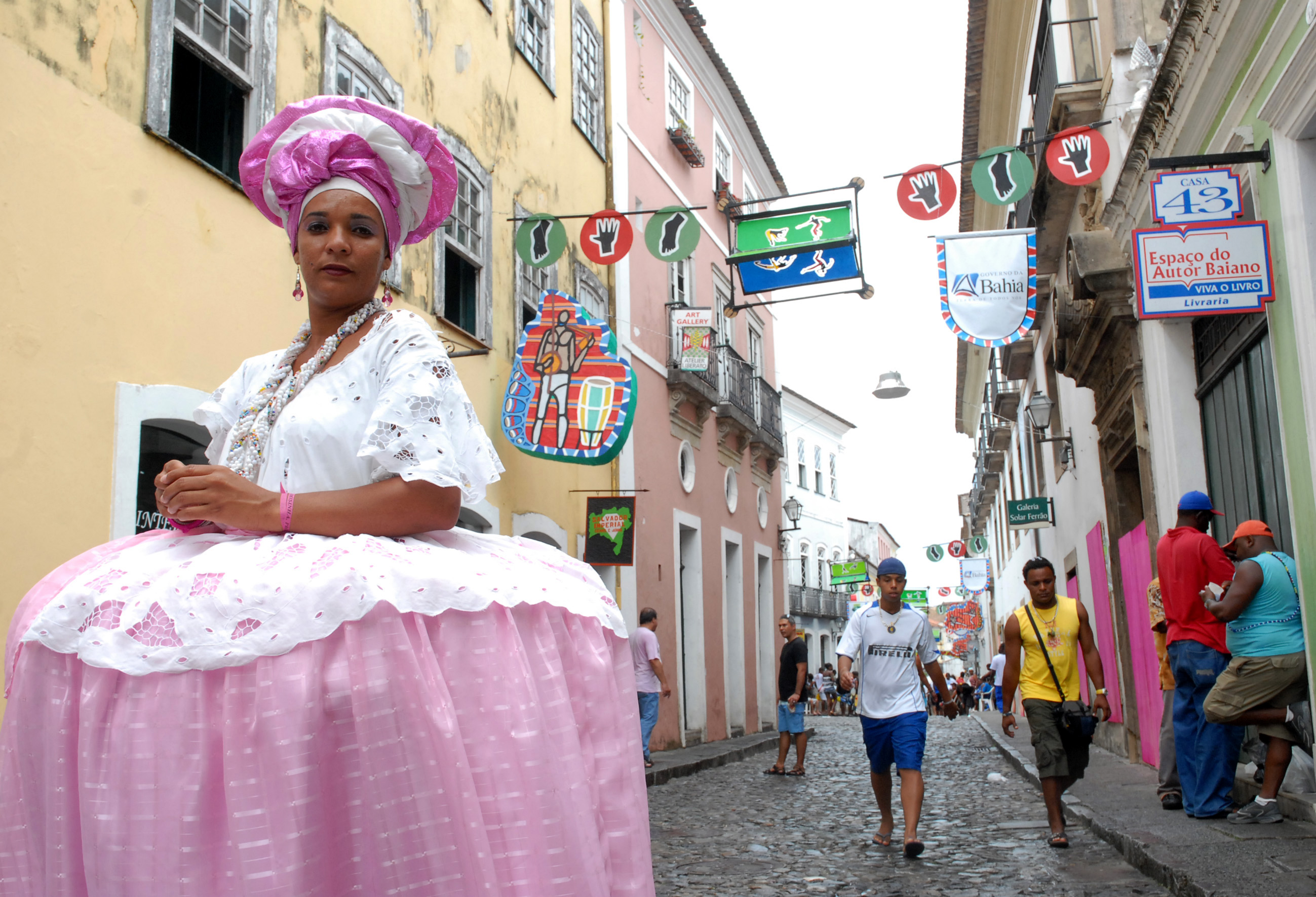 Baiana em uma rua do Pelourinho, Salvador, Brazil